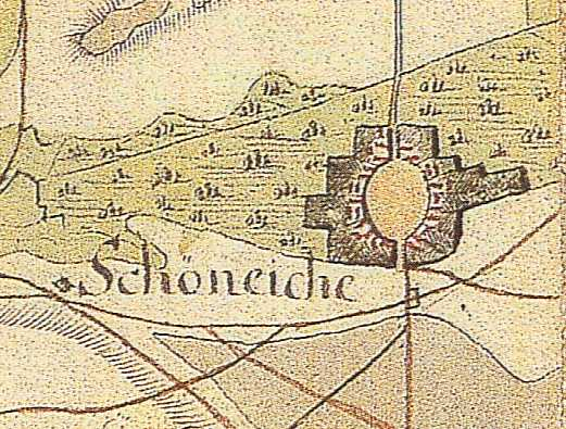 Schöneiche auf der Schmettau'schen Karte von 1767-87, Schöneiche, Stadt Zossen, Brandenburg, Deutschland